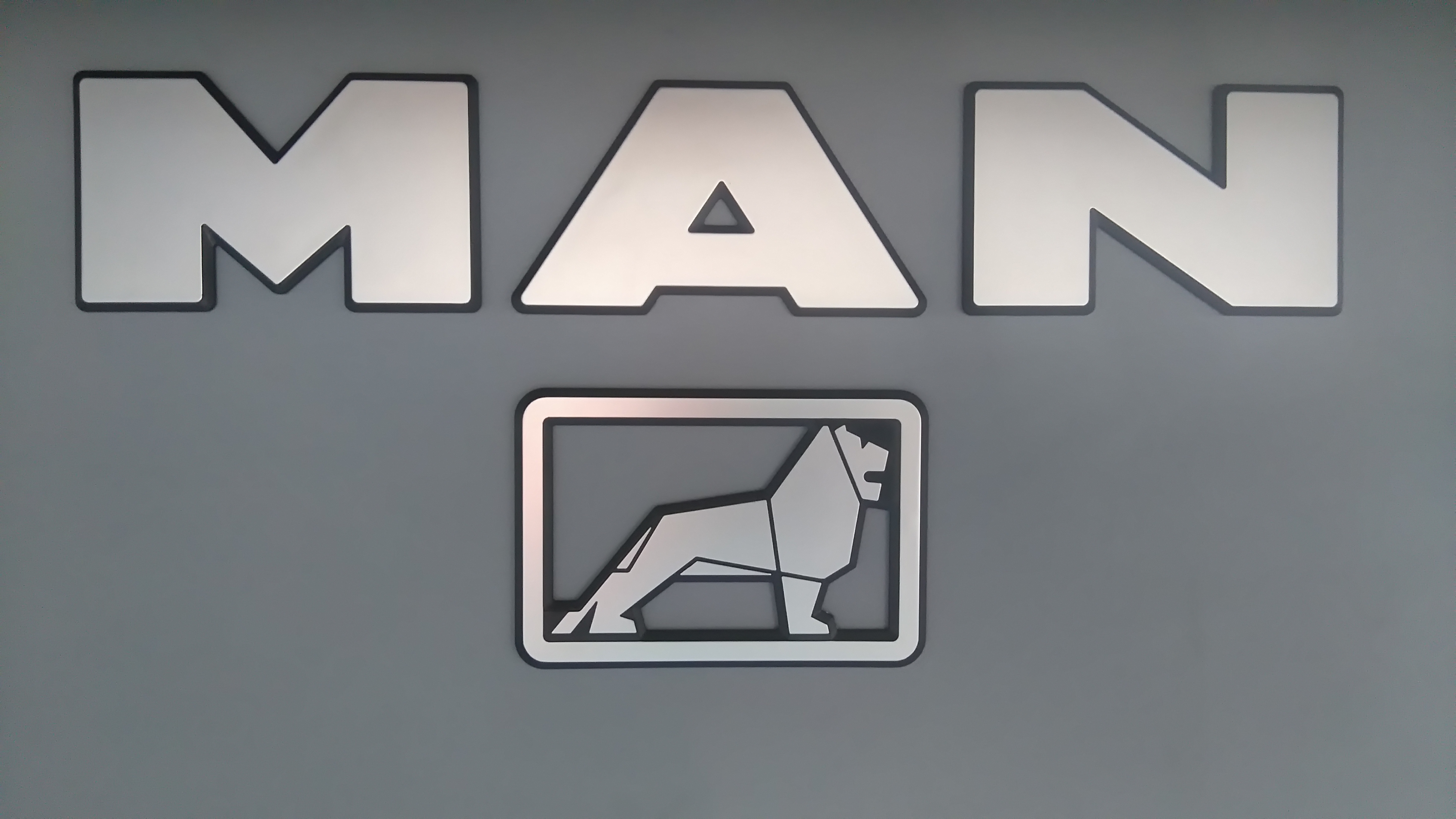 Logo MAN